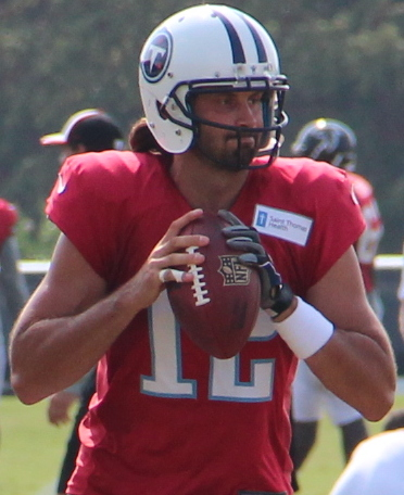 Charlie Whitehurst